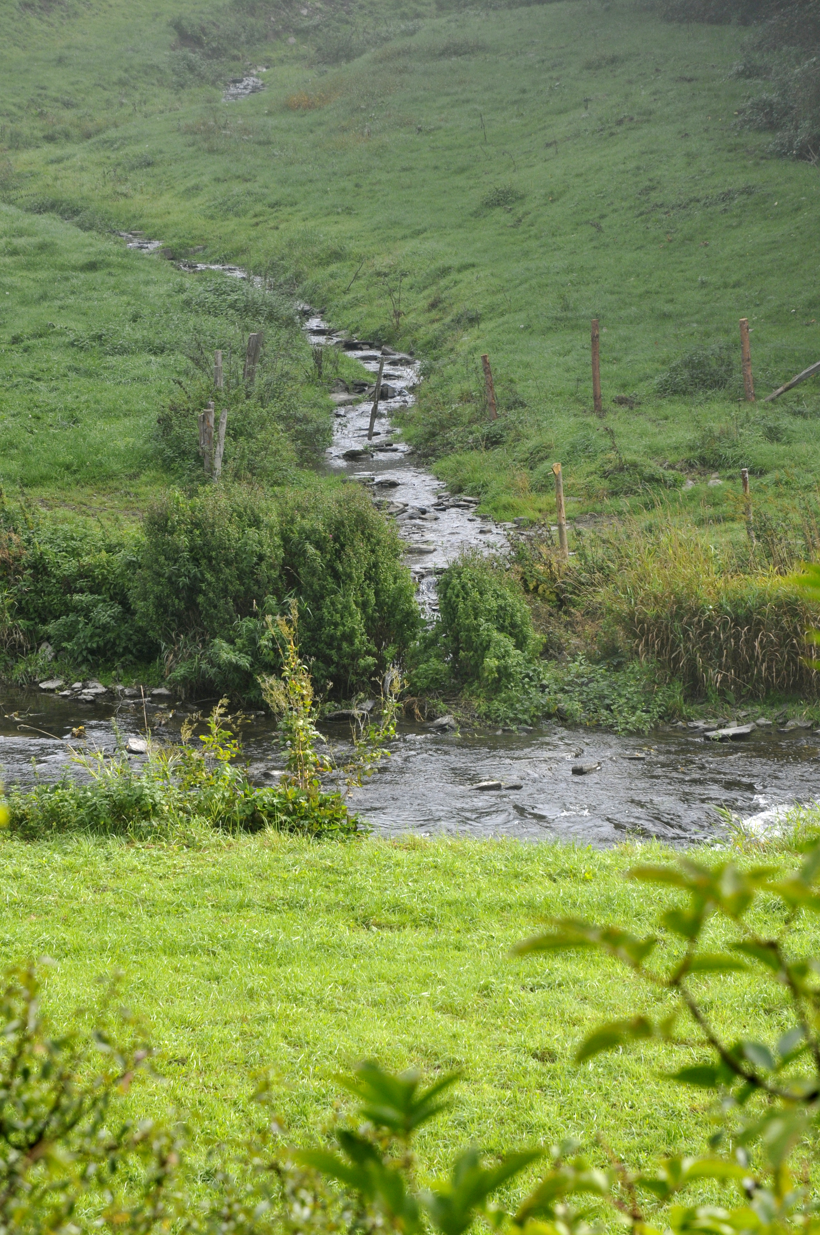 Nërdlech vun der Schibbreger Mille leeft d'Jopich an d'Klierf.